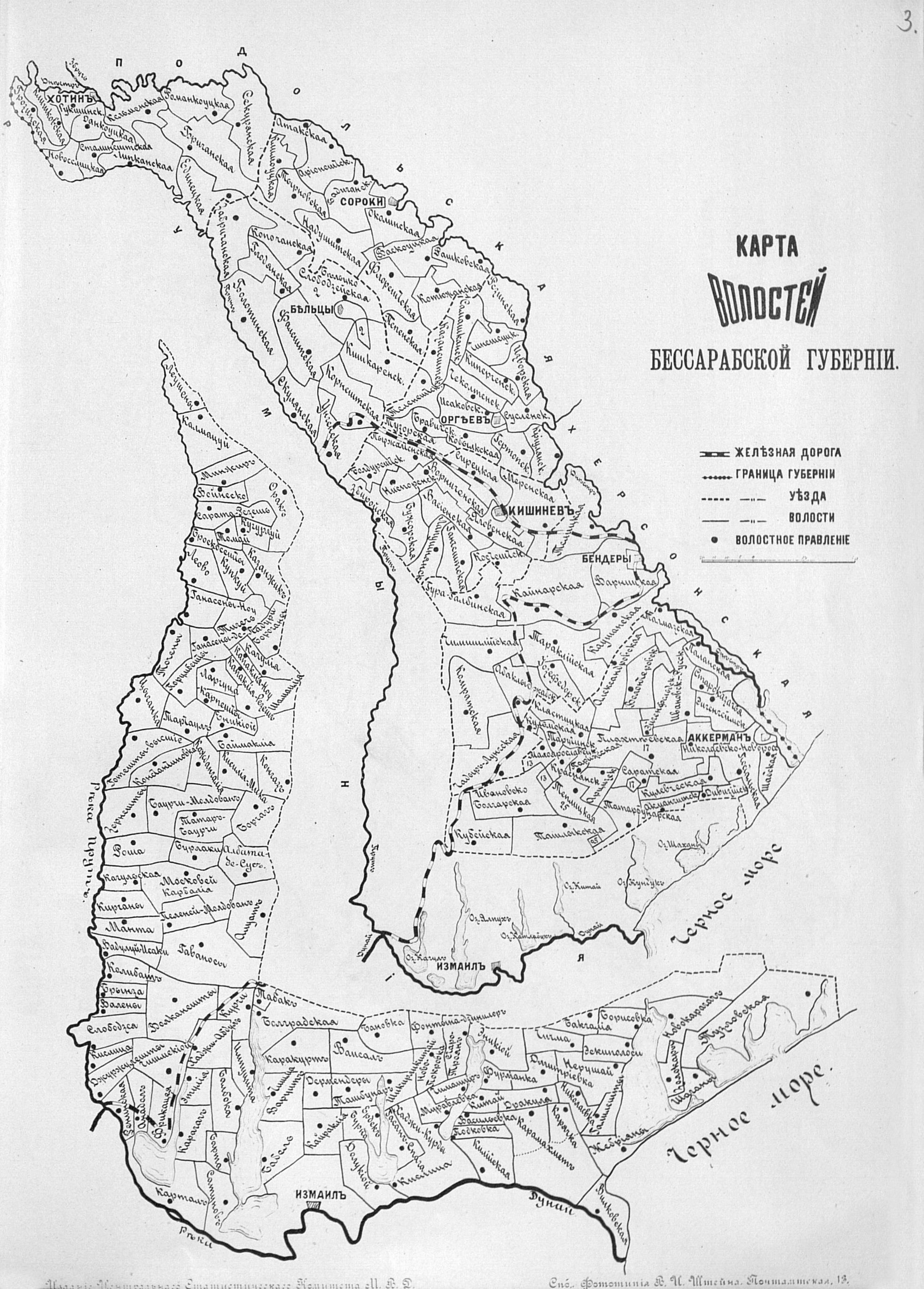 Карта волостей Бессарабской губернии